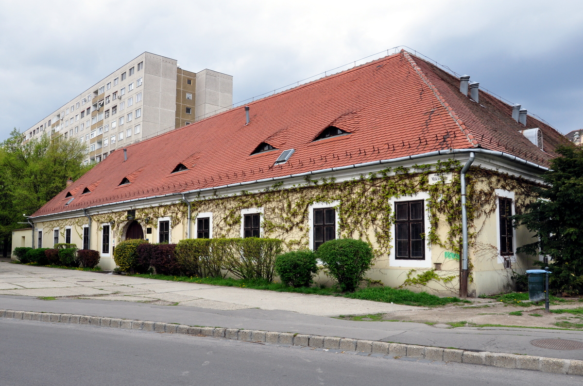 Selyemgombolyító, Óbuda, Budapest